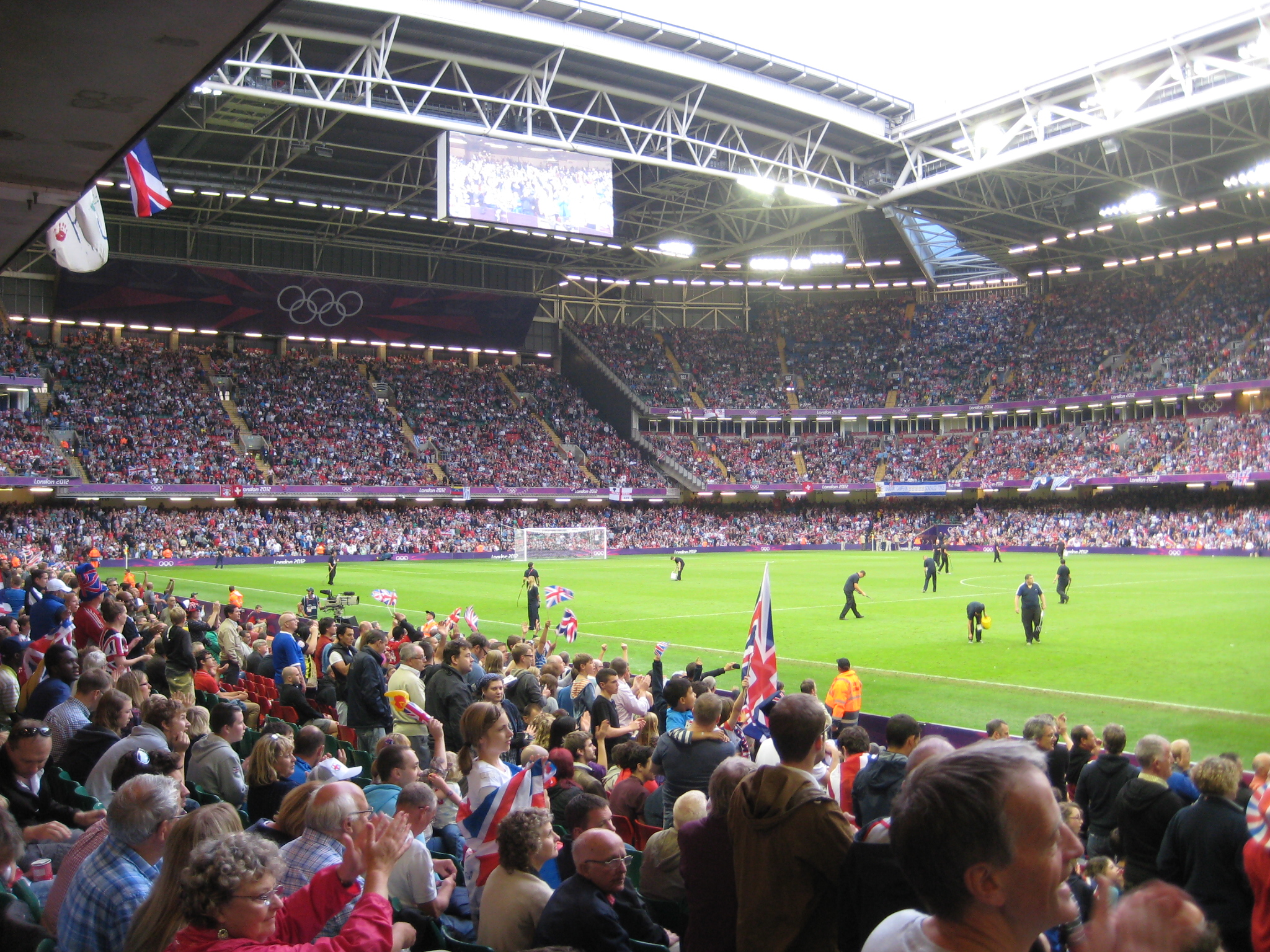 Millennium Stadium 1